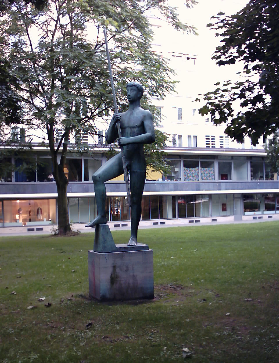 Grindelhochhäuser, Hamburg-Harvestehude, Plastik: "Großer Speerträger" von Fritz Fleer